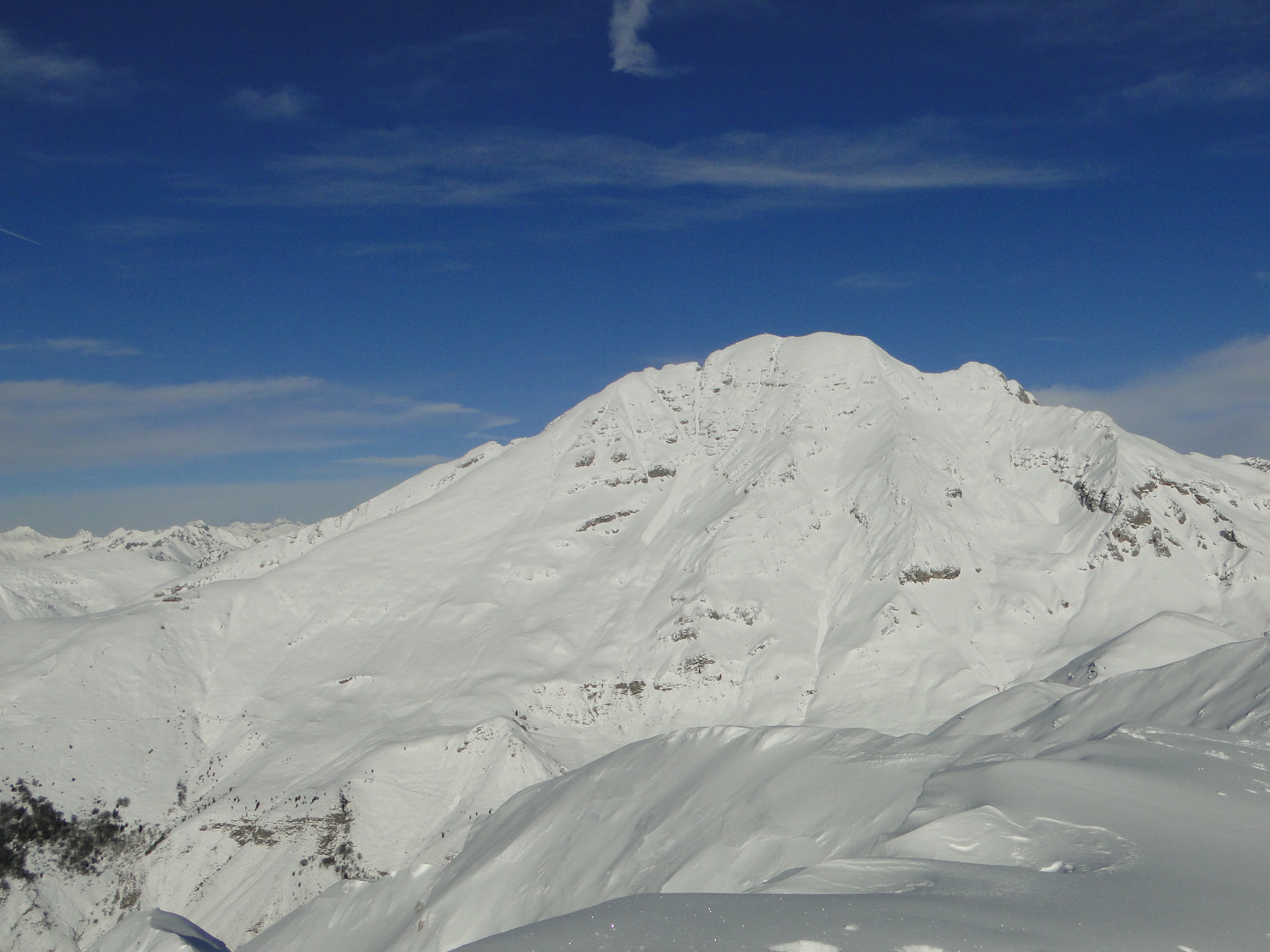 Il pizzo Arera, visto dalla cima di Grem. Val Seriana (BG)